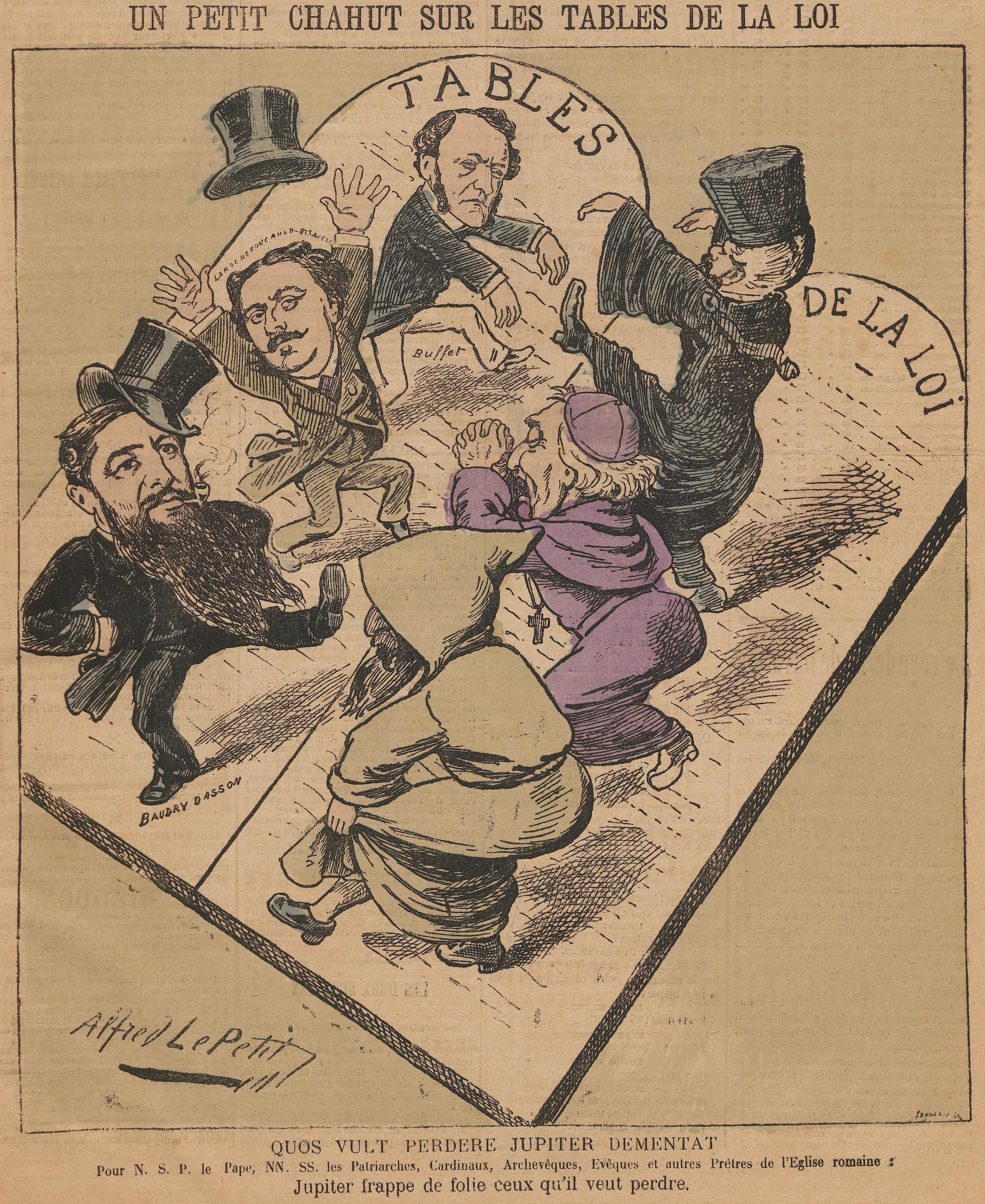 "Un petit chahut sur les tables de la loi".